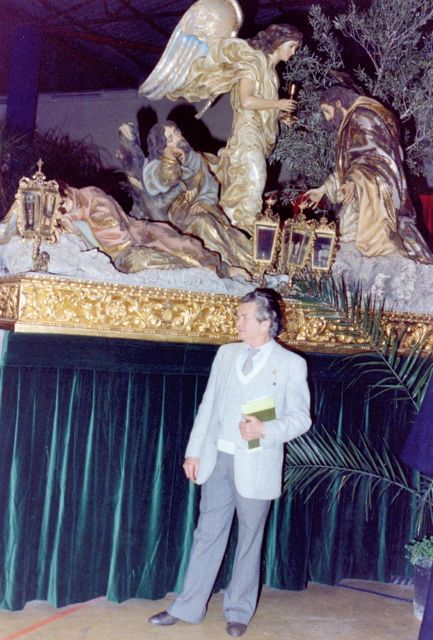 Antonio Ballester